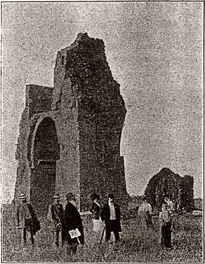 Guido von List aux abords du Heidentor, 1911